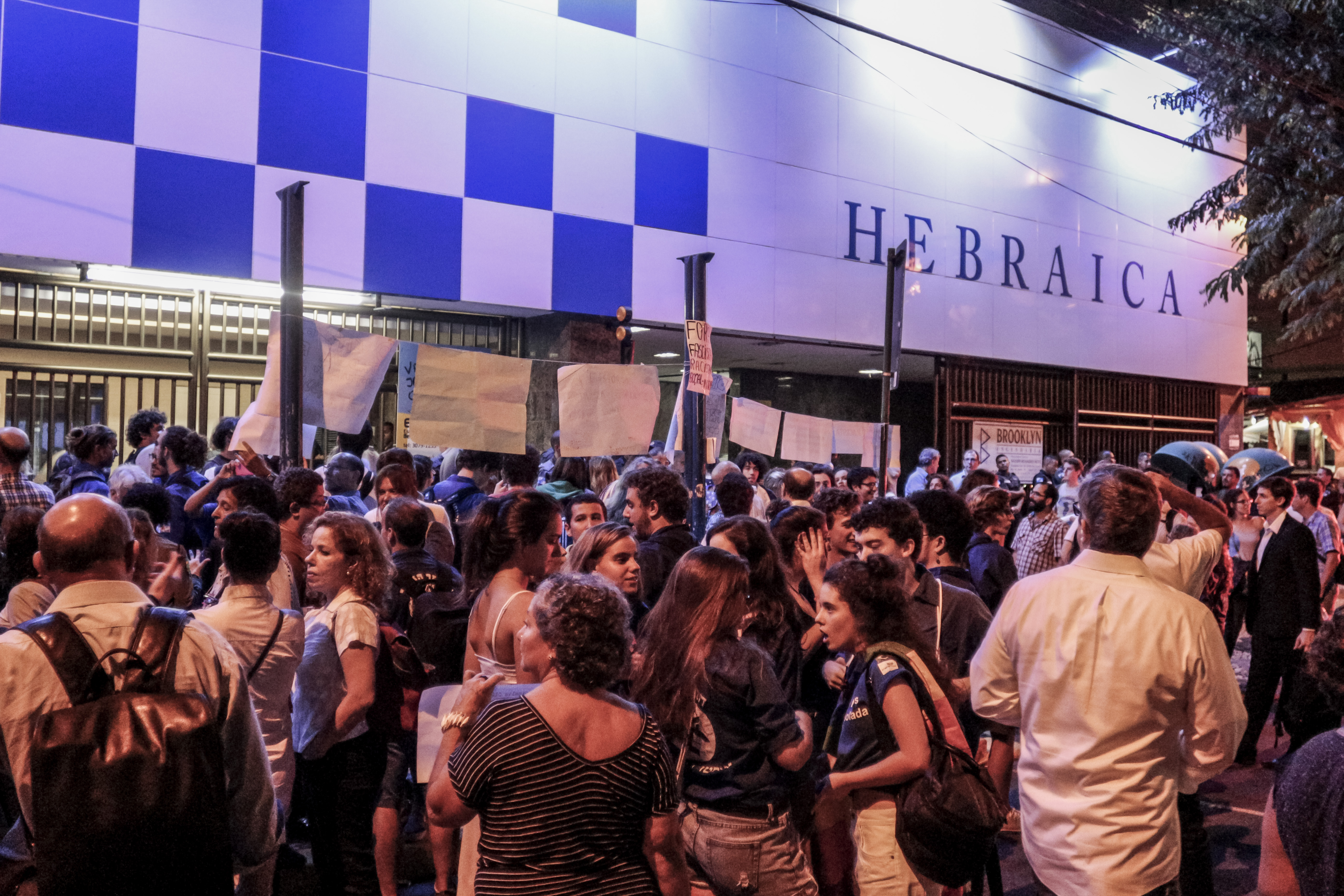 Jair Bolsonaro e o Clube Hebraica Rio de Janeiro, localizado em Laranjeiras, foram surpreendidos por um protesto no início desta noite. O motivo da ação foi porque a Hebraica convidou o deputado misógino para uma palestra "em nome de toda a comunidade judaica", o que acabou ofendendo (e com razão) judeus e judias que são contrários as ideologias fascistas de Bolsonaro, que se manifestaram baixo o lema #NãoEmNossoNome Foto: Ramon Aquim / Mídia NINJA